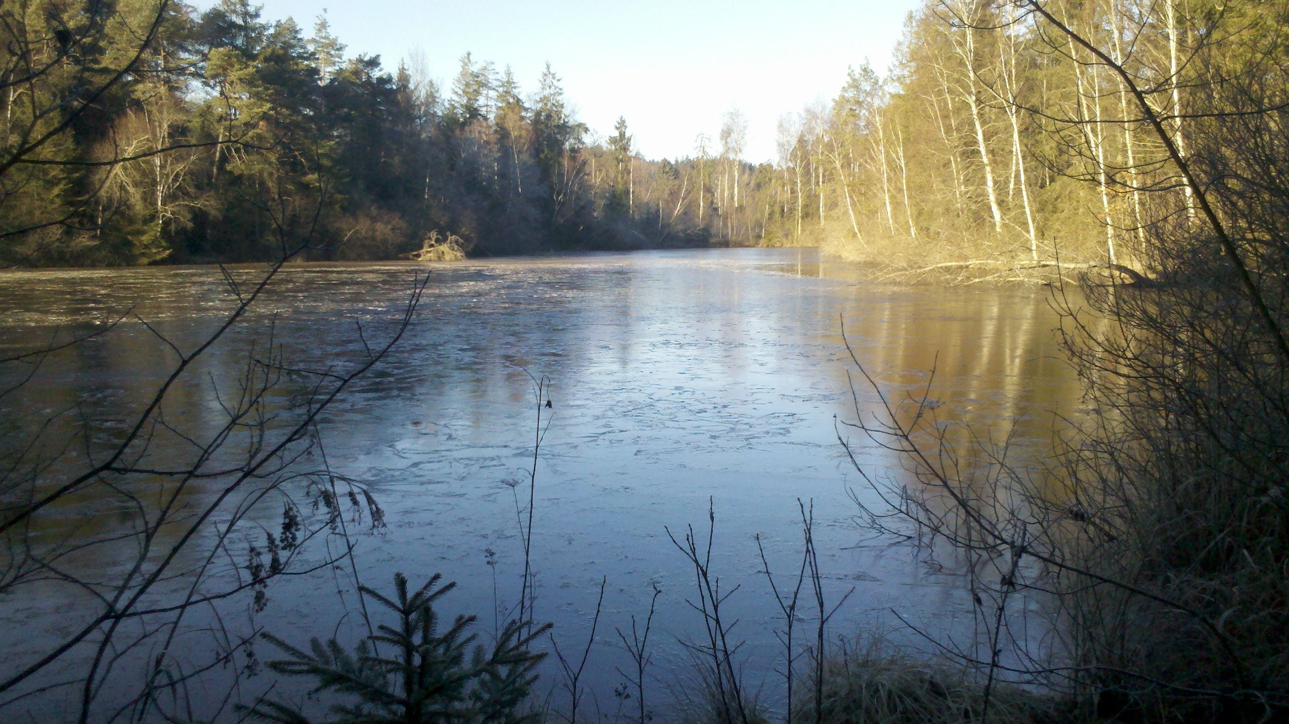 Kitzelsee, Nähe